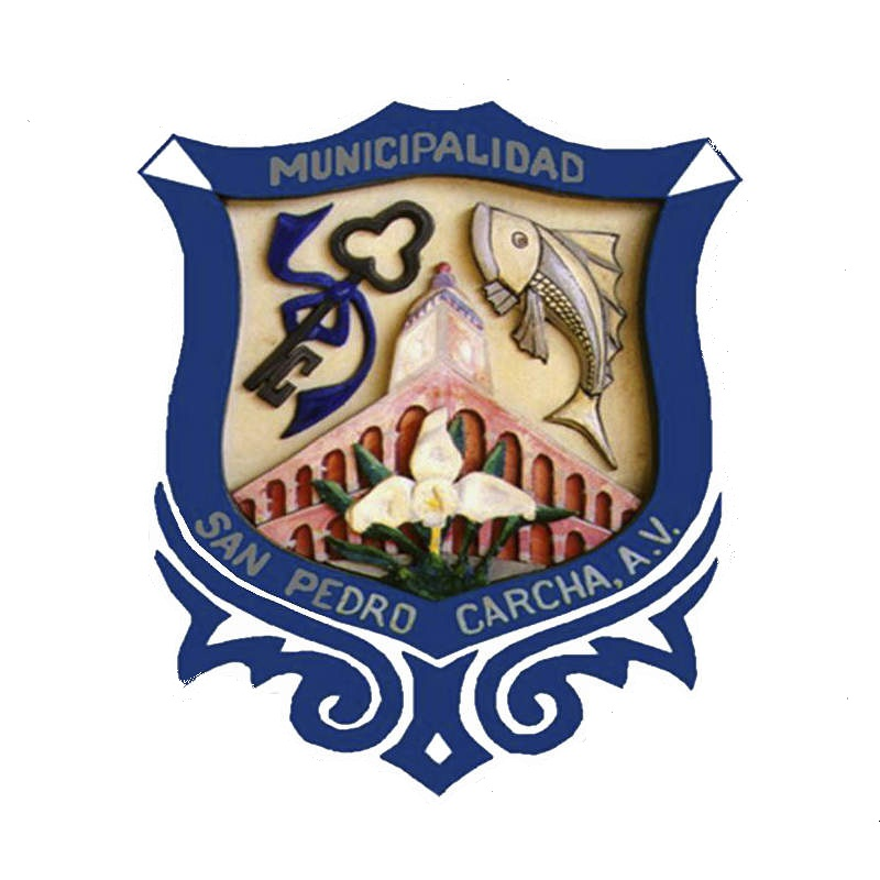 llave representante del patrono de Carcha